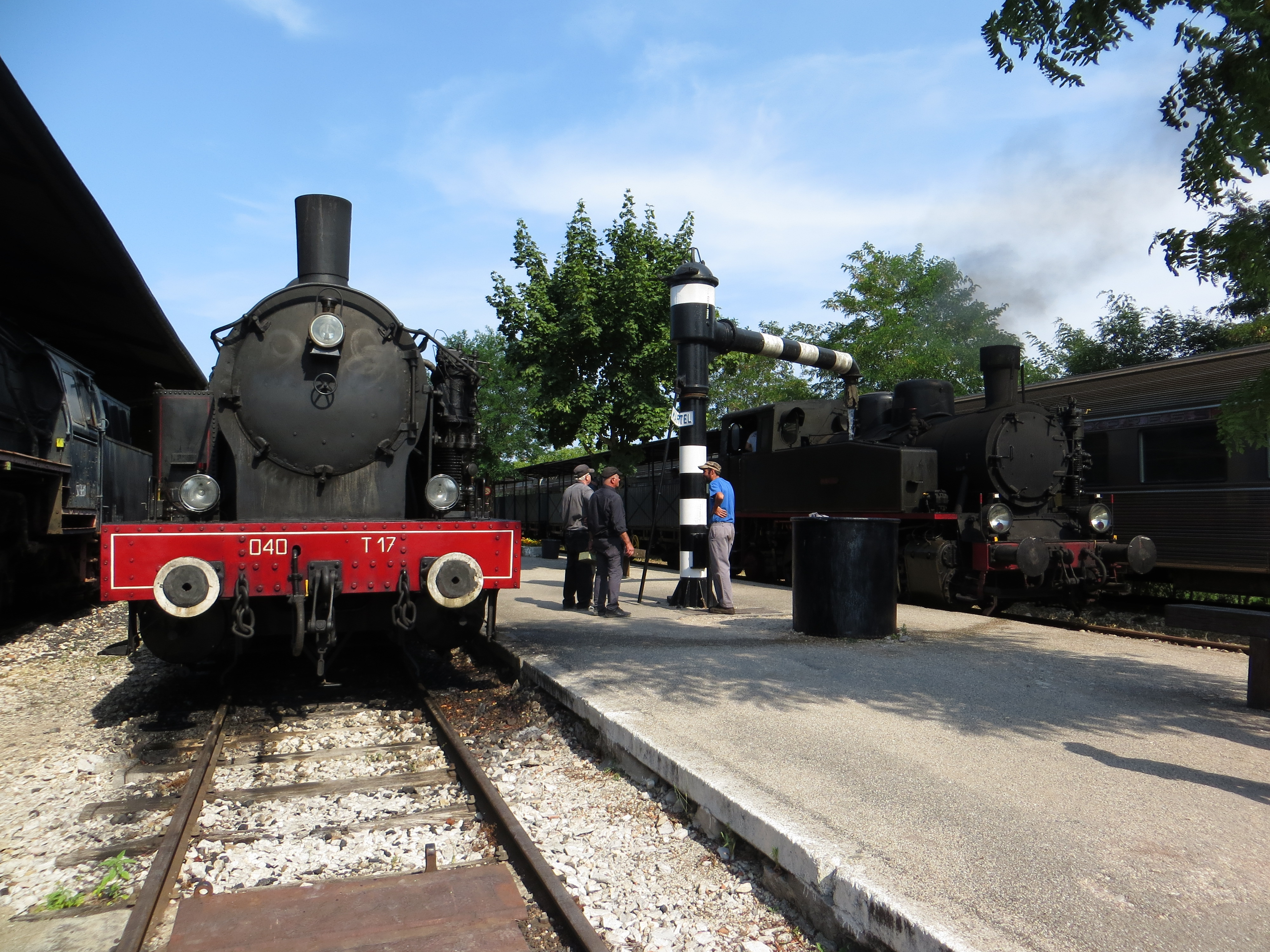 La 040 T17 SACM et la 030 Tkh 5703 Ferrum toutes les deux en chauffe et à quai en gare de Martel